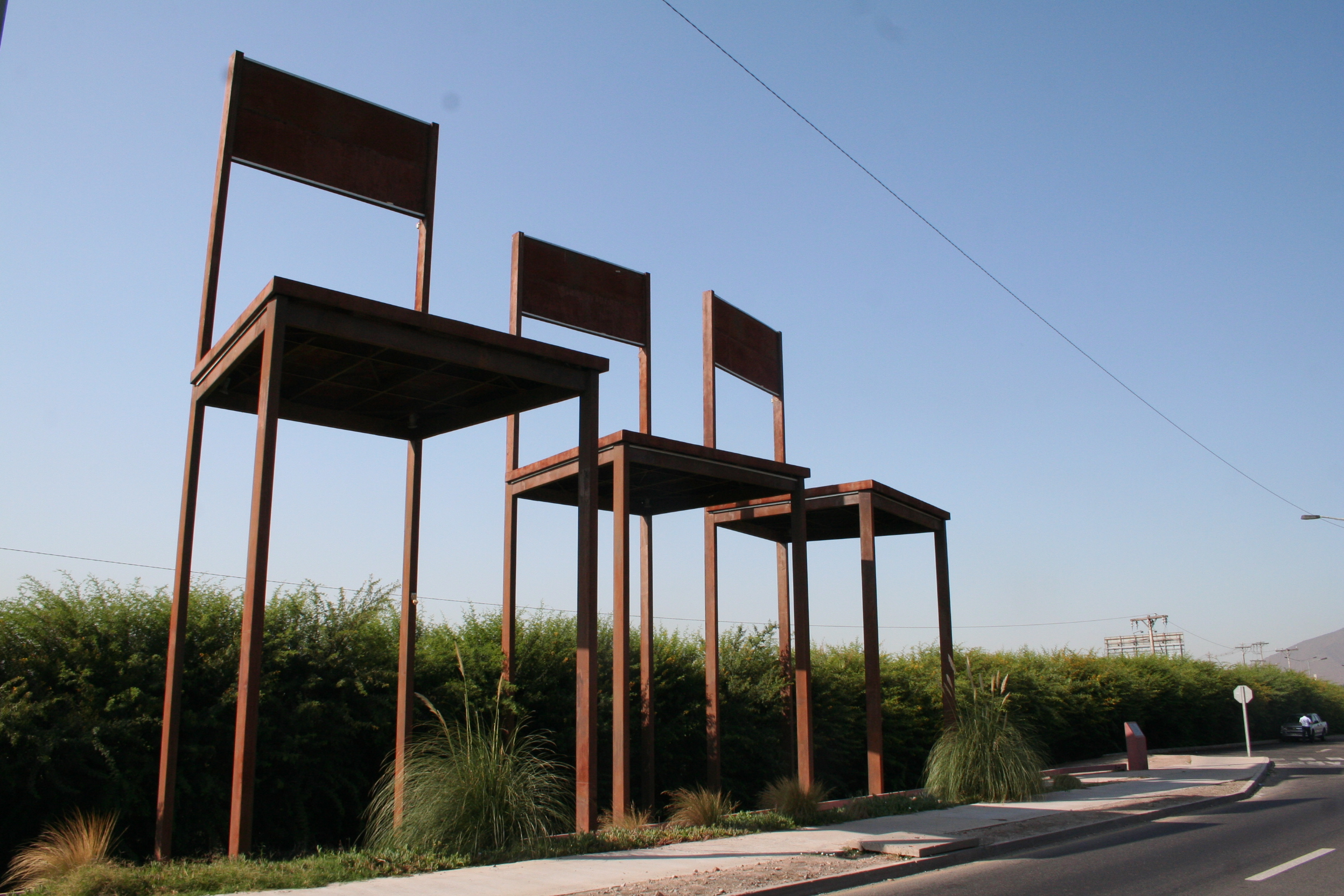 Memorial conmemorativo de la violación de los DDHH en Chile durante el régimen de Pinochet